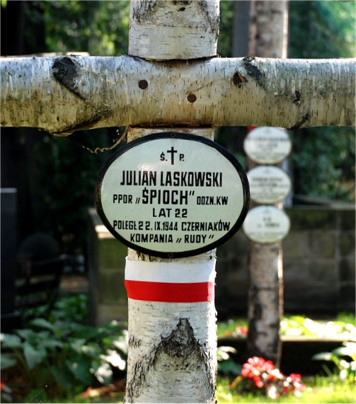 Nad grobem Juliana Laskowskiego na Powązkach wojskowych w Warszawie